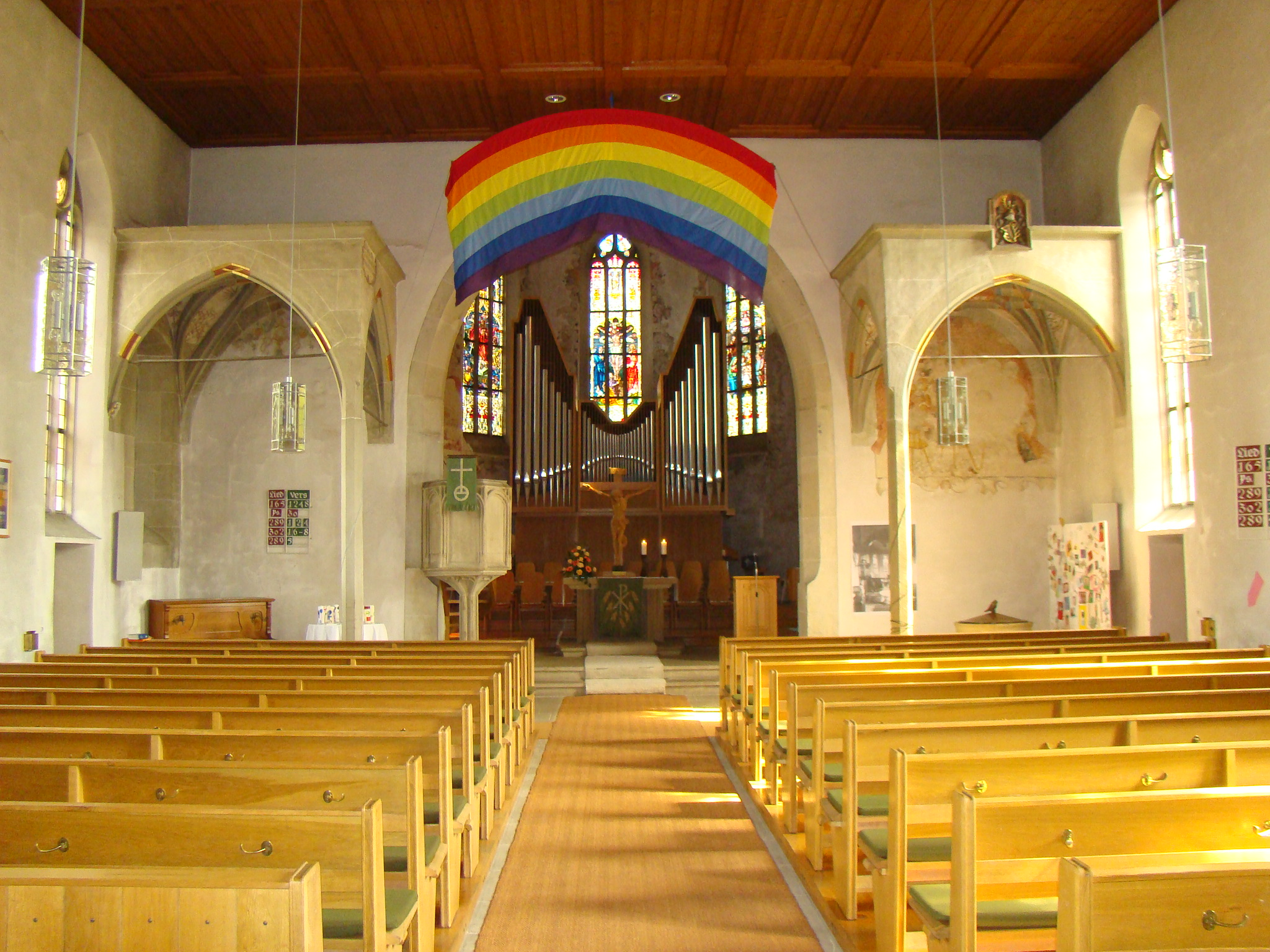 Johanneskirche in Gemmrigheim; noch mit der Orgel von 1964 im Chorraum (2012 abgebaut und nach Berlin verkauft)